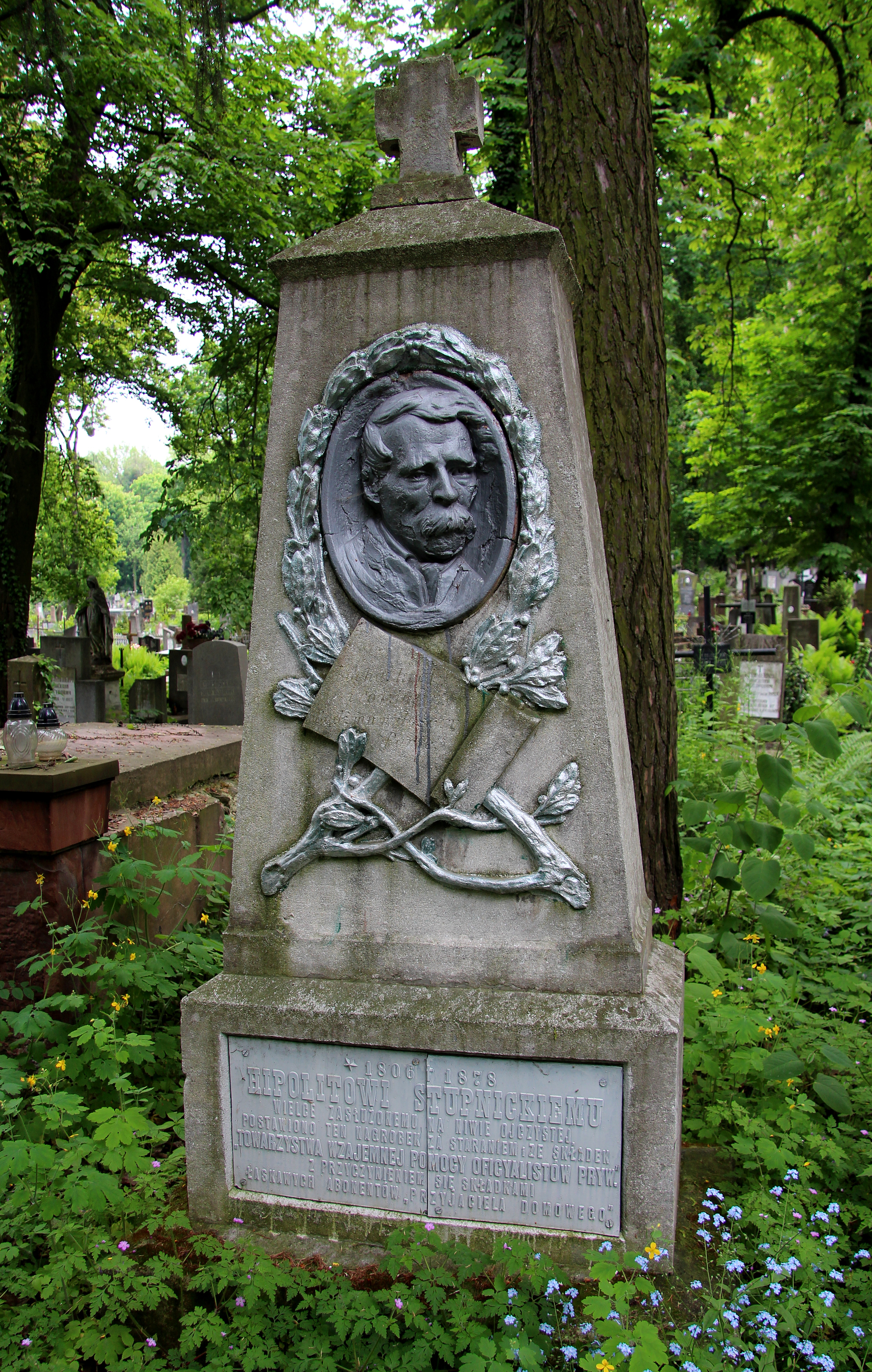 Пам'ятник на могилі І.Ступницького.Личаківський цвинтар , поле № 60.